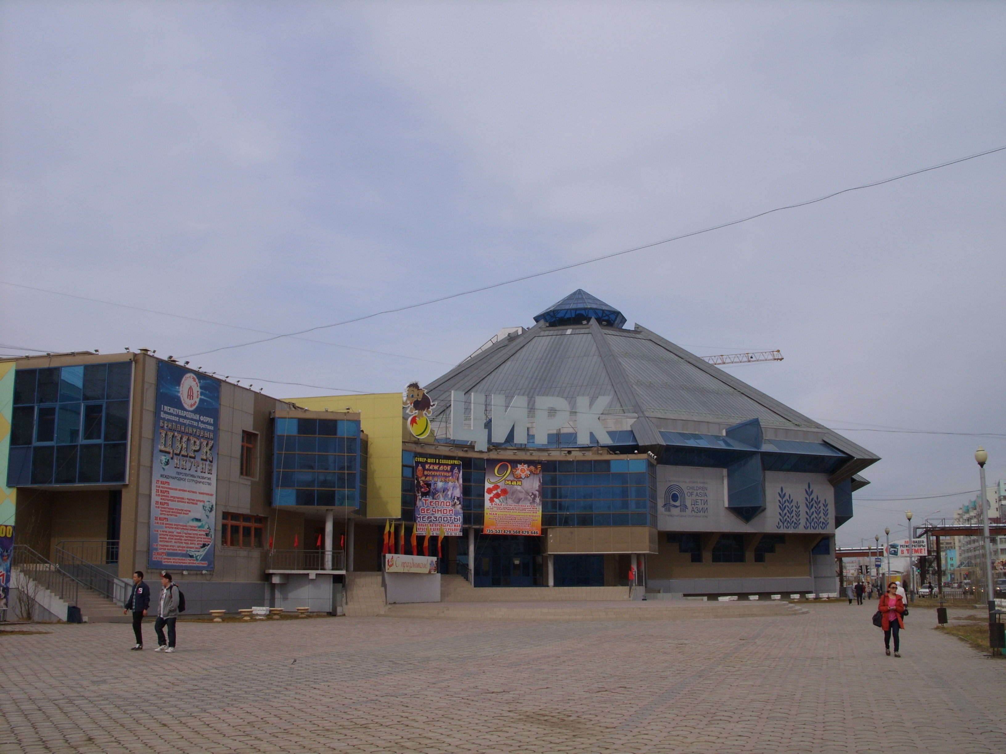 Государственный цирк Республики Саха (Якутия) "Мамонтёнок"